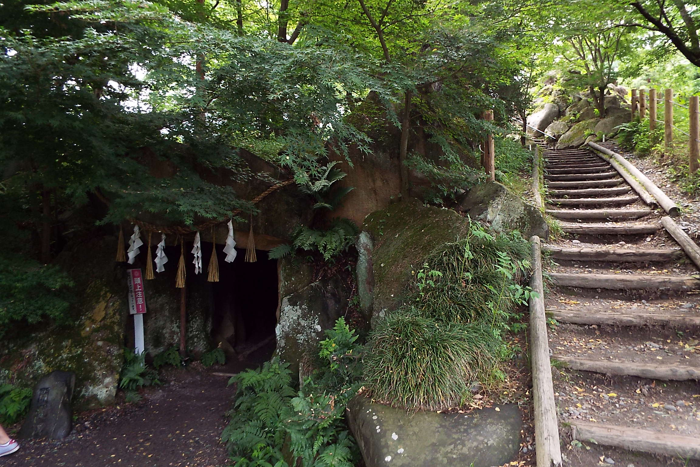 2016-07-03 Daio Wasabi Farm 大王わさび農園